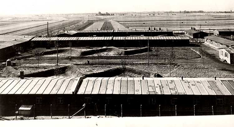 Blick auf das 'Ausländerlager' der M.A.N.-Gustavsburg 'Am Rosengarten'; östlich des Werkes Am Haagweg; im Vordergrund die Holzbaracken für die 'Ostarbeiter'